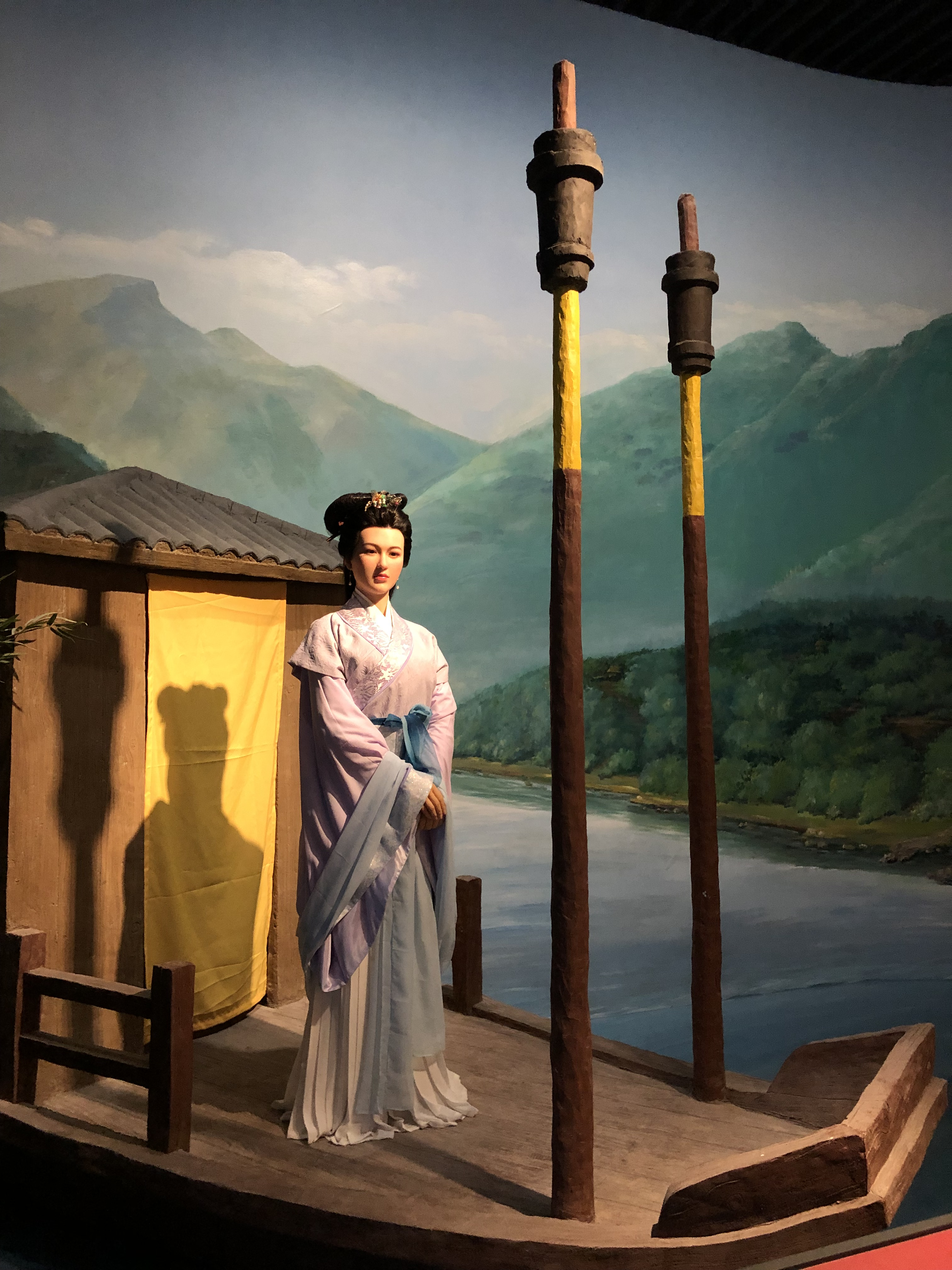 中文（中国大陆）: 位于湖北省宜昌市伍家岗区柏临河路的宜昌博物馆。王昭君蜡像。